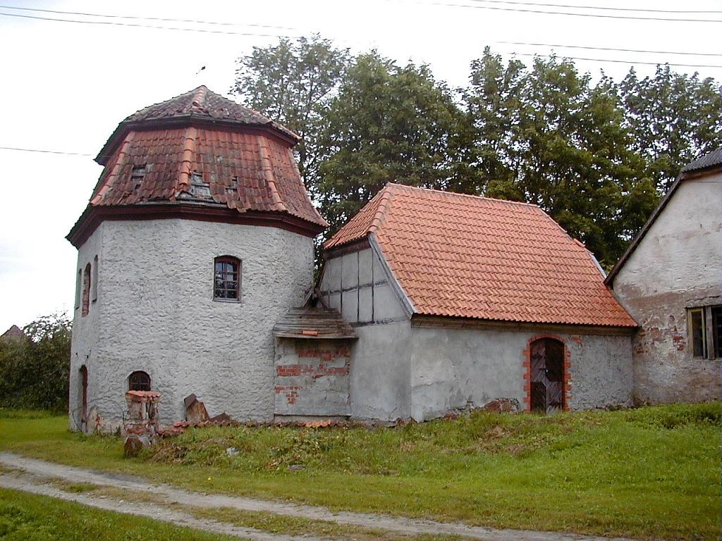 Valdgales muiža. 2004-08-13